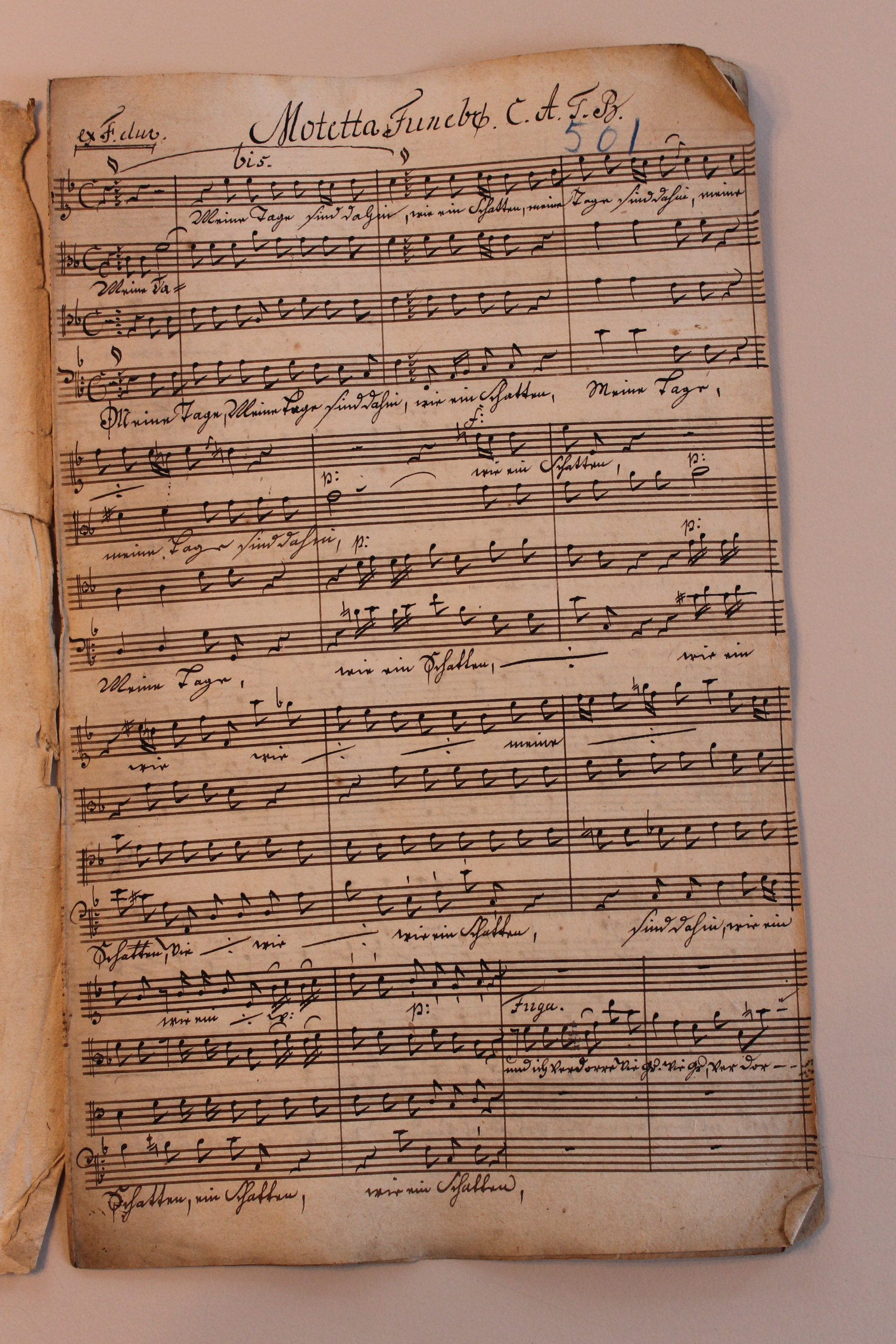 erste Partiturseite der Trauermotette "Meine Tage sind dahin wie ein Schatten" von Fueldner, 2. Hälfte 18. Jh.